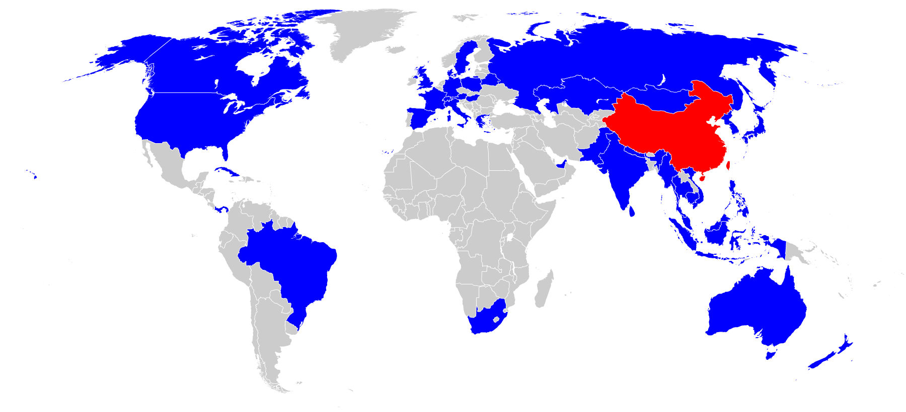 Дестинације Ер Чајне